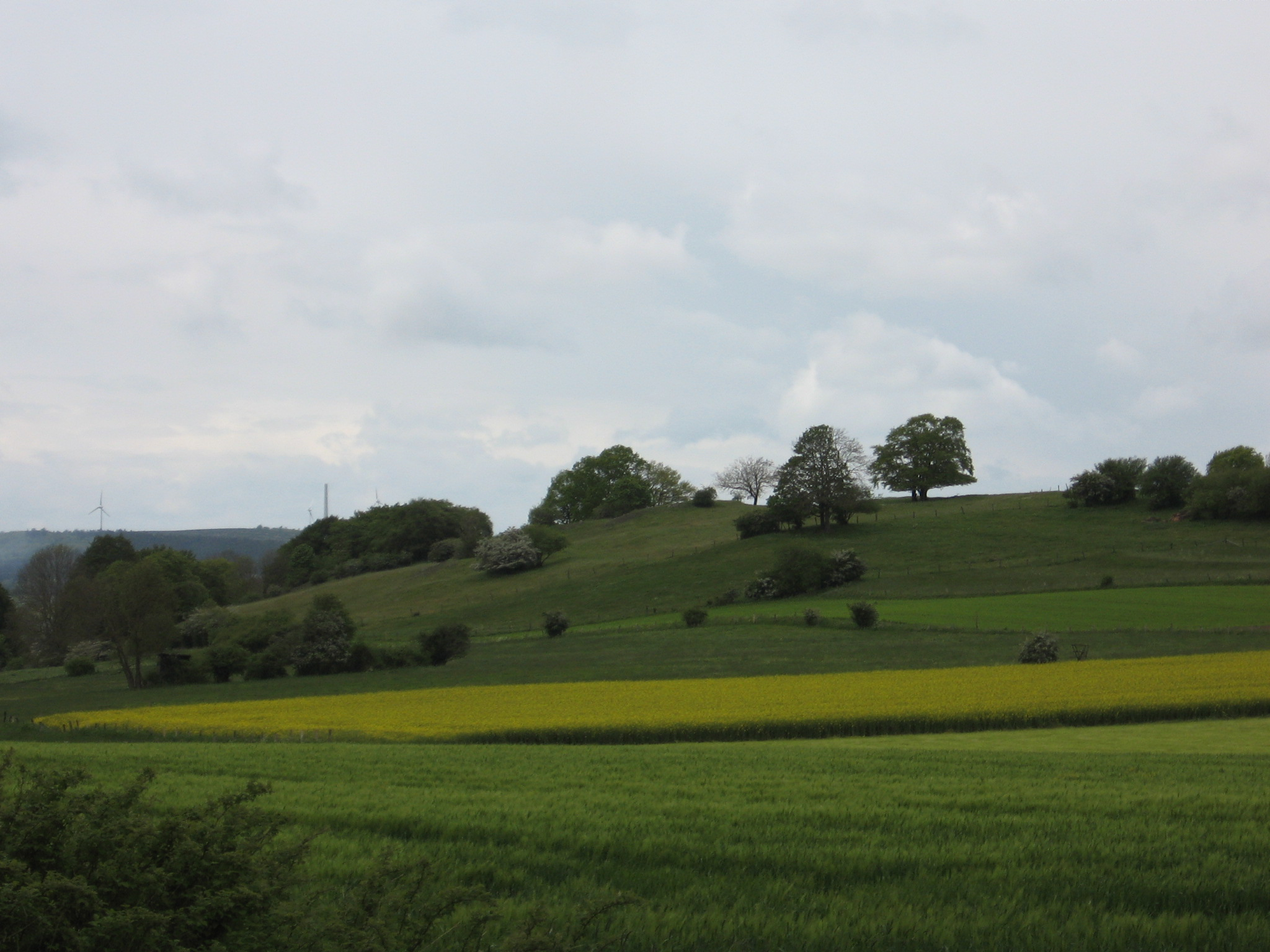 Das Naturschutzgebiet Schaaken von Südosten aufgenommen. Zum NSG gehören die Flächen am Hang.